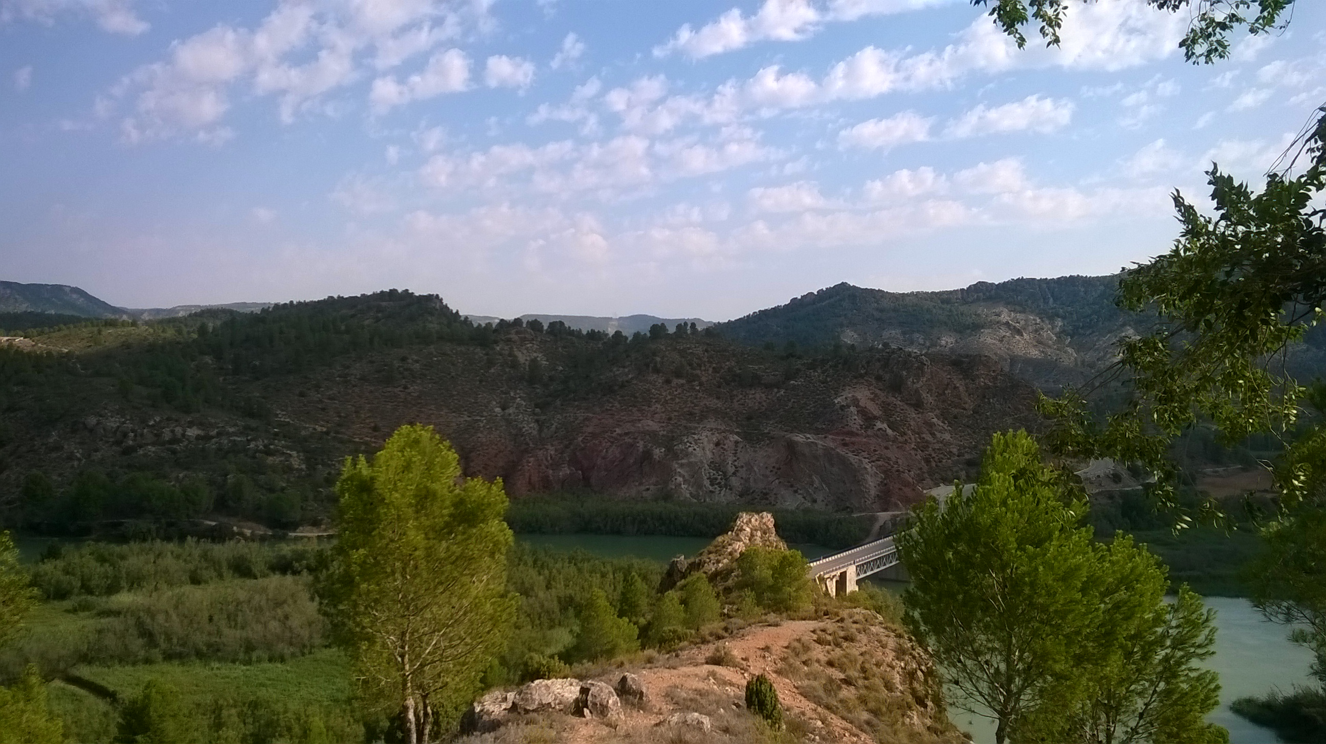 Vistas de Cofrentes tomadas durante el verano de 2014 por Isabel Valiente de la Granja.